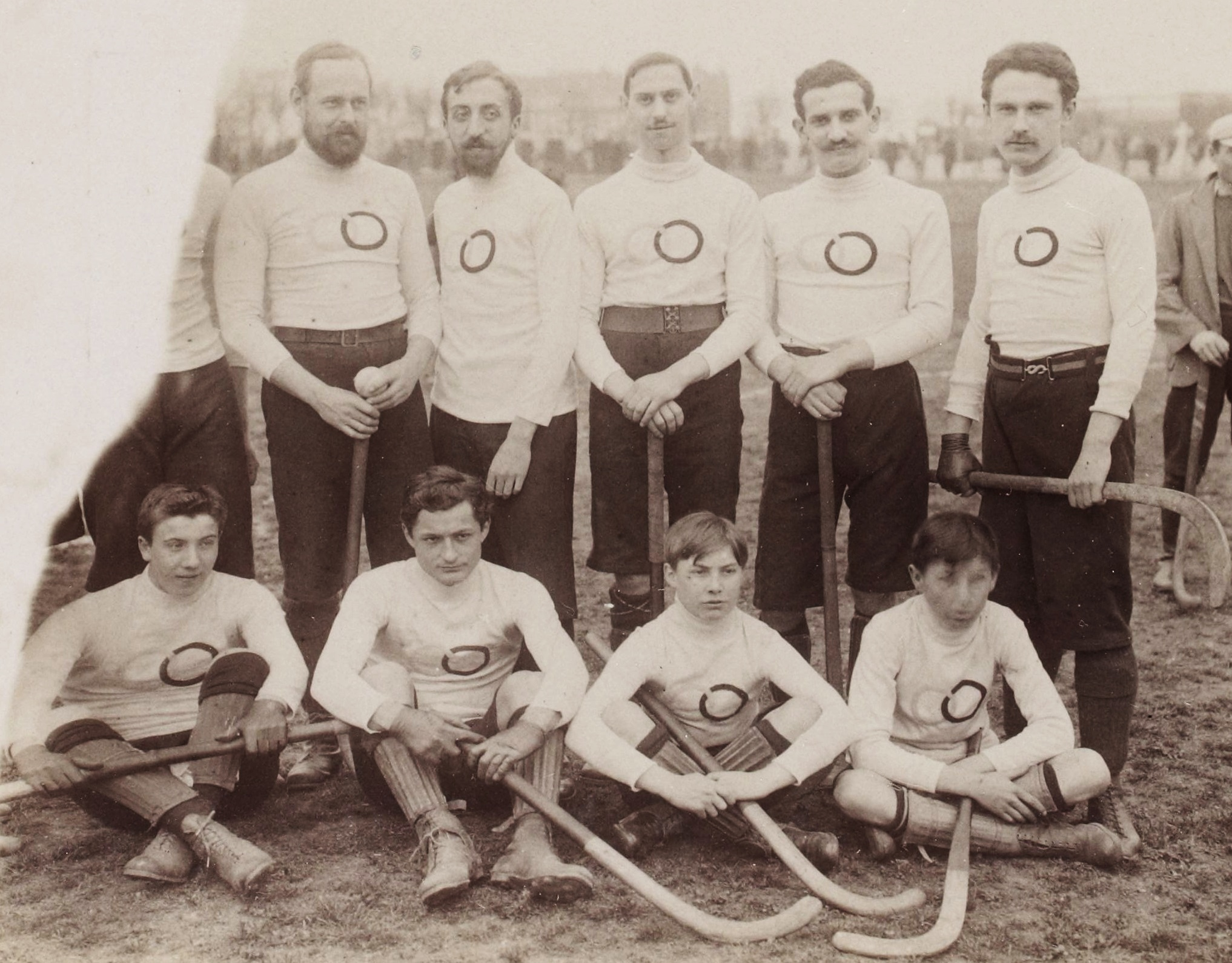 [Collection Jules Beau. Photographie sportive] : T. 8. Années 1898 et 1899 / Jules Beau : F. 44v. Match international de hockey